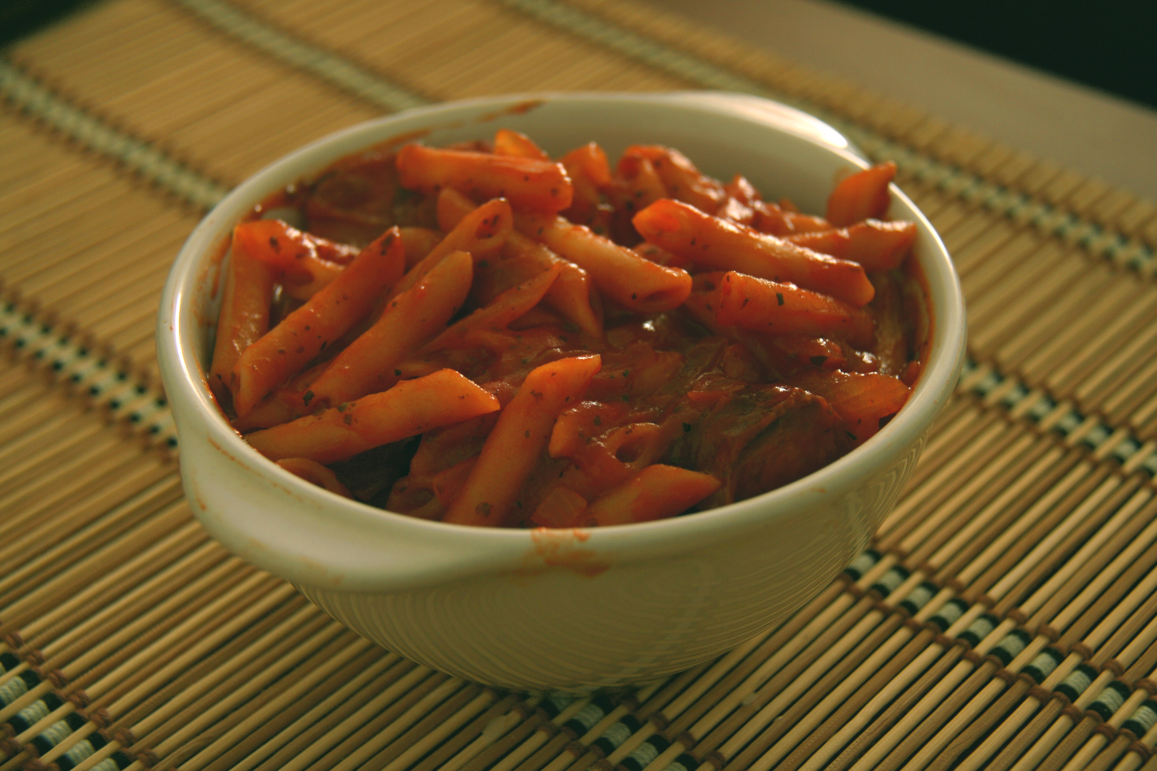 Macarrones con chorizo en su salsa de tomate, rociados con orégano